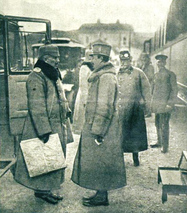 Sestanek na kraški postaji: cesar Karel in nemški cesar Viljem.